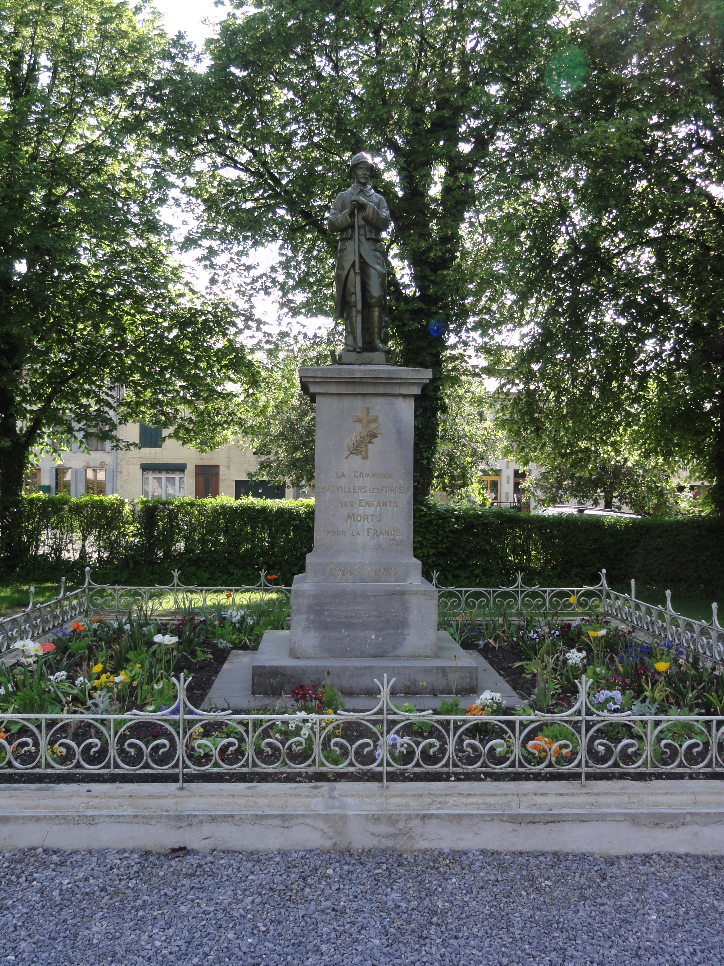 Auvillers-les-Forges (Ardennes) Monument aux morts 1914-1918